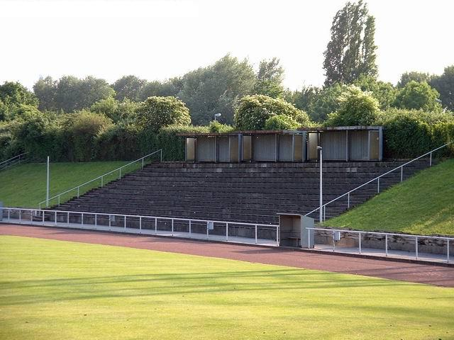 Stadion MathiasStinnes